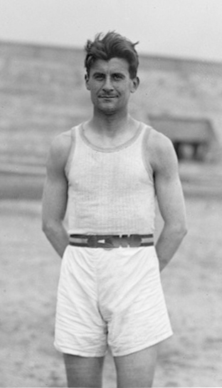 Gustave Remouet : [photographie de presse] / [Agence Rol]